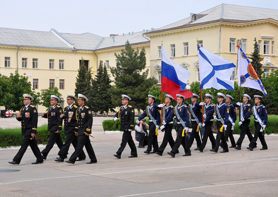 Торжественное вручение Боевого знамени Черноморскому высшему военно-морскому ордена Красной Звезды училищу имени П.С. Нахимова.